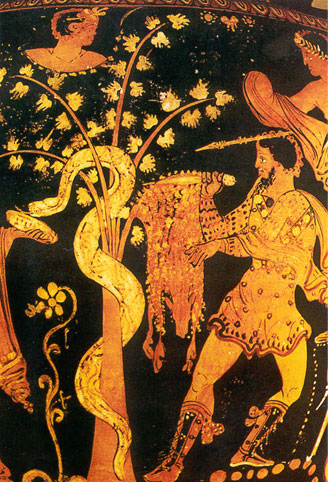 Dit plaatje komt van een vaas en is op internet gezet door een Engelse toeristische Griekenland-site.